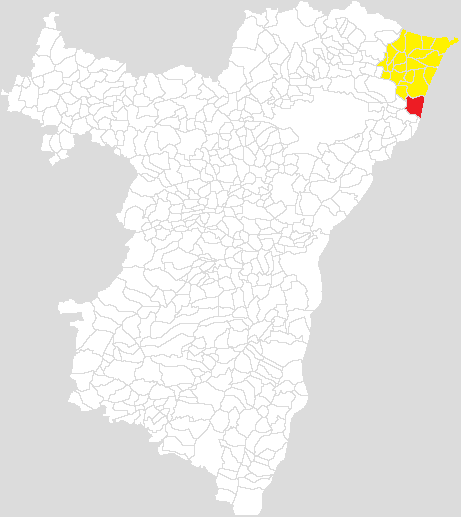 Communauté de communes de la plaine du Rhin